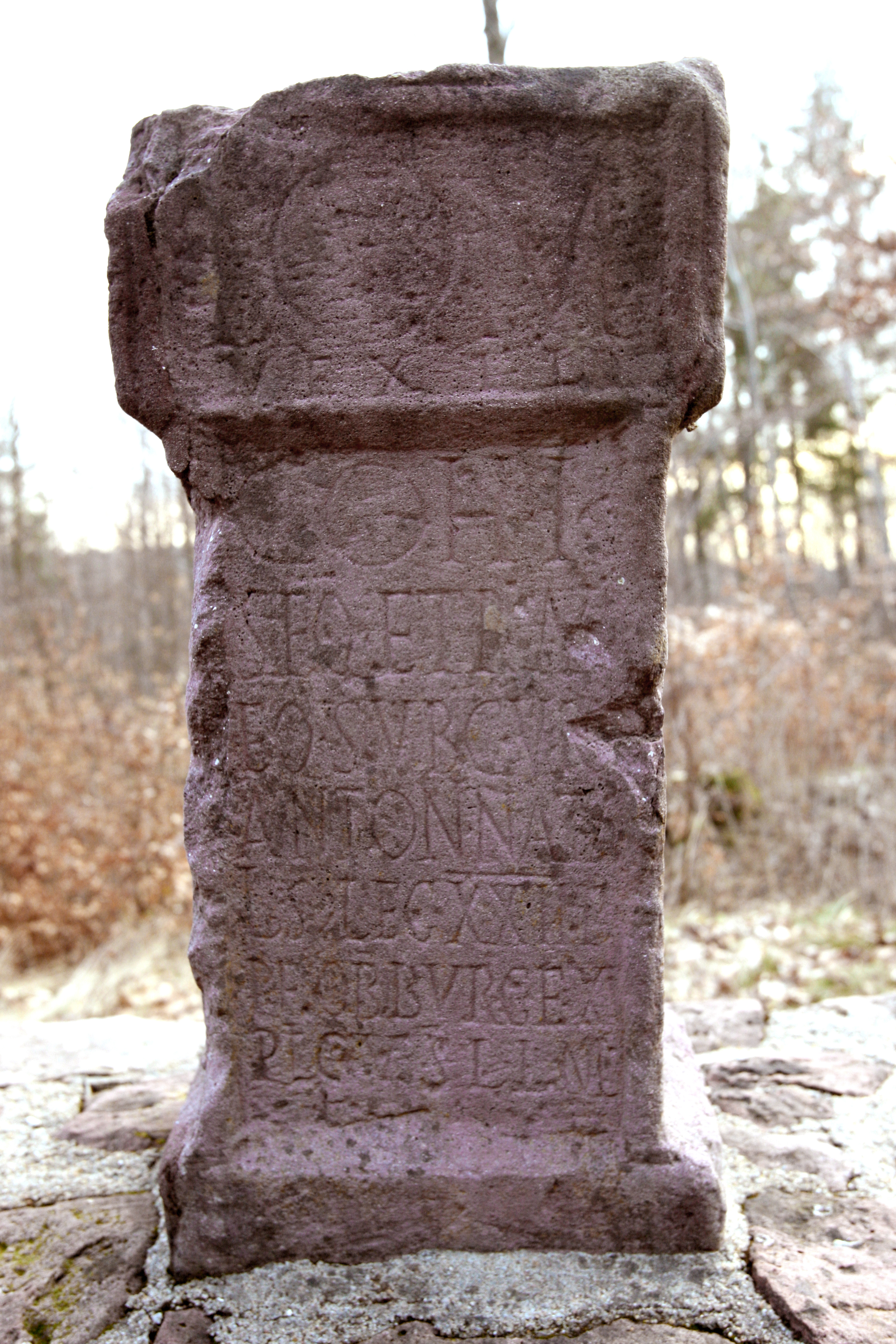 Limesturm Wp 10/37 "In der Schneidershecke" bei Schloßau. Kopie der Jupiterweihung CIL 13, 06509 am Turm. Text: I(ovi) O(ptimo) M(aximo)/ VEXIL(latio)/ COH(ortis) I/ SEQ(uanorum) ET RAVR(icorum)/ EQ(uitatae) SVB CVR(a)/ ANTONI NATA/LIS )(centurionis) LEG(ionis) XXII P(rimigeniae)/ P(iae) F(idelis) OB BVR(um) EX/PLIC(itum) V(otum) S(olvit) L(ibens) L(aetus) M(erito)